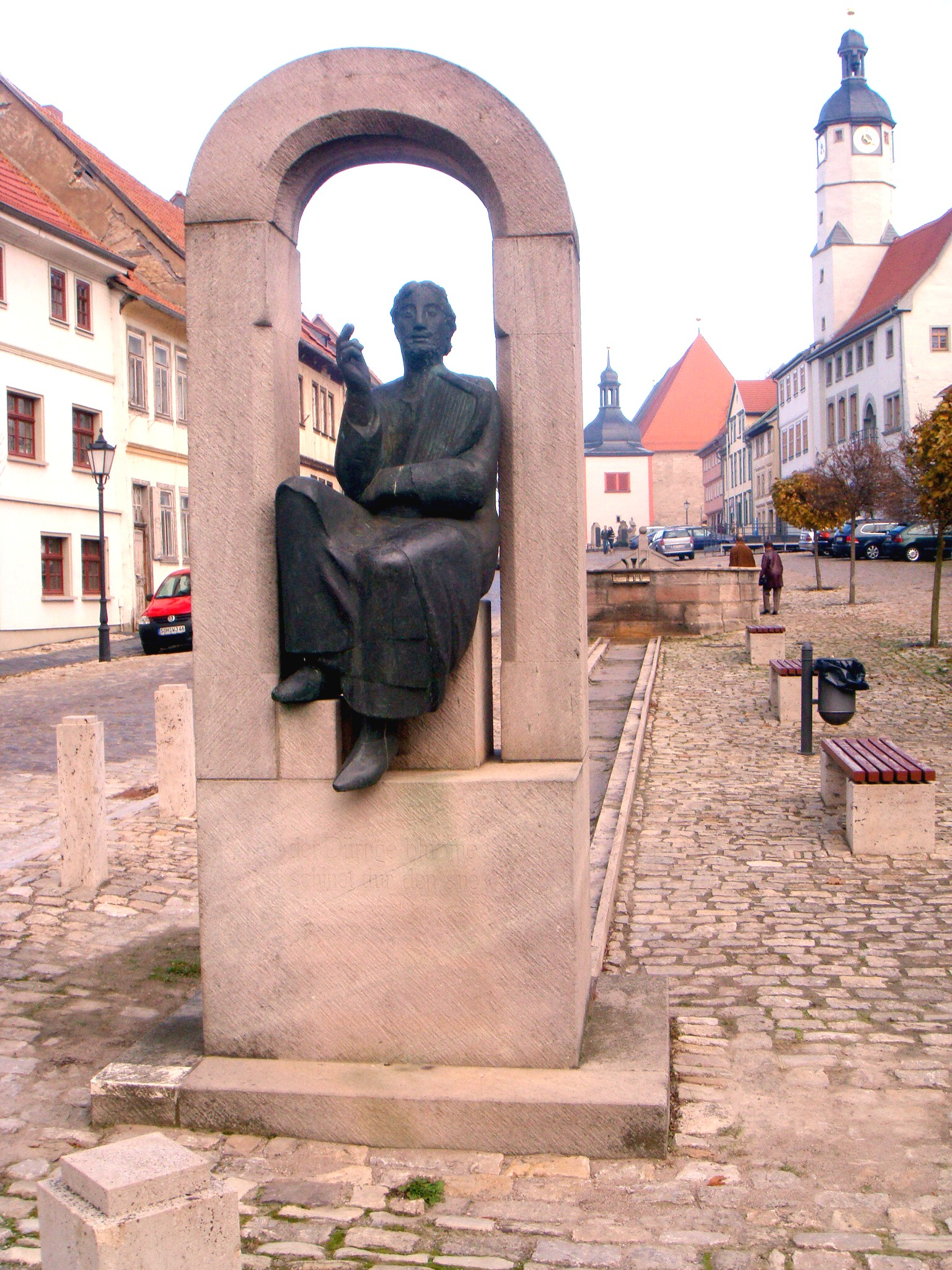 Denkmal für Walther von der Vogelweide auf dem Marktplatz von Weißensee/Thüringen